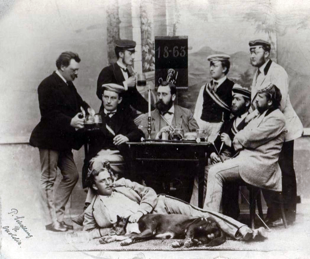 Fotografie der Gründer der Erlanger Pfarrerstochter (offizielle Konstitution), gewidmet dem Corps Onoldia